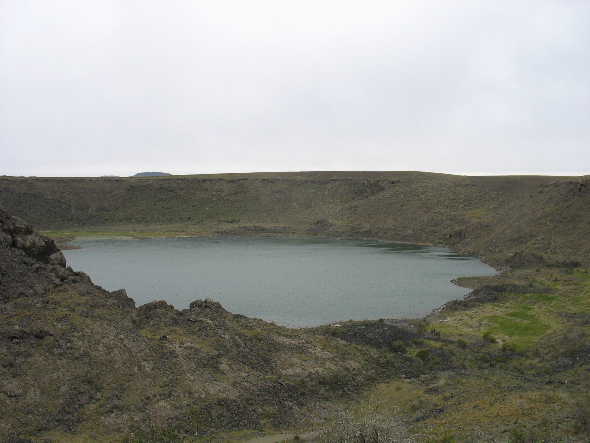 Vista de la margen sur de la Laguna Azul (Río Gallegos, Santa Cruz, Patagonia Argentina)